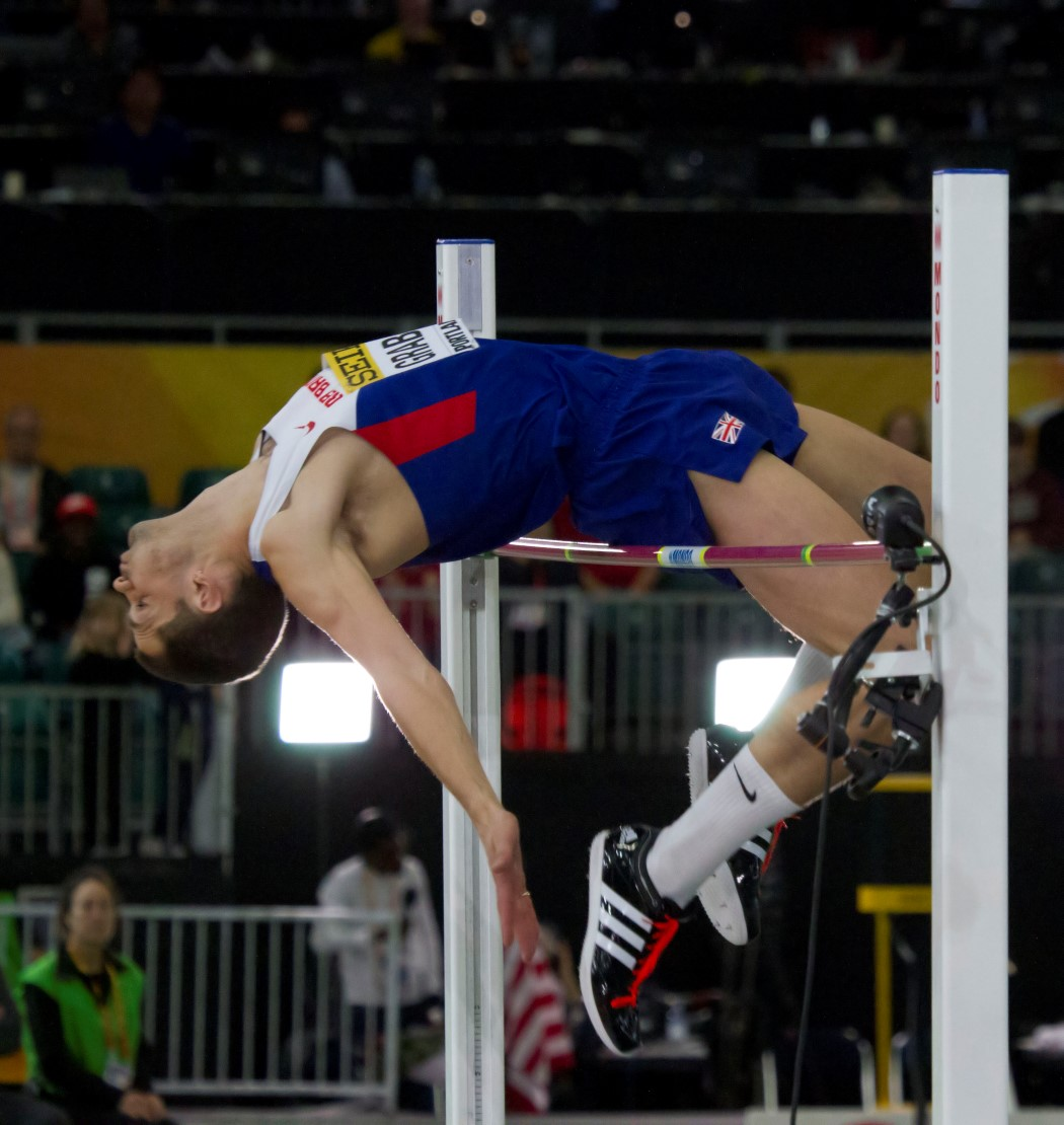 590 grabarz poging 2m36